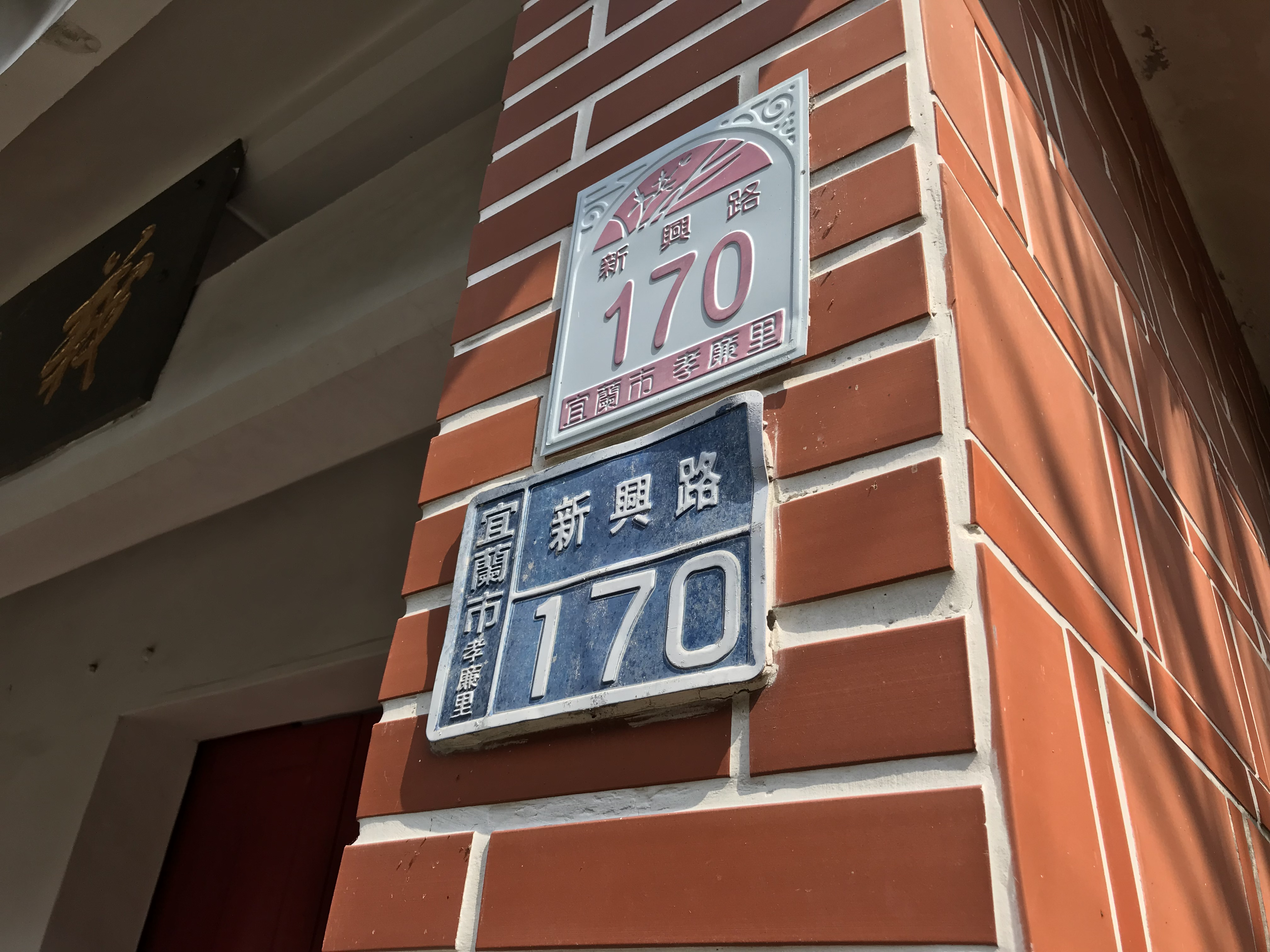 中文（台灣）: 宜蘭孔子廟門牌